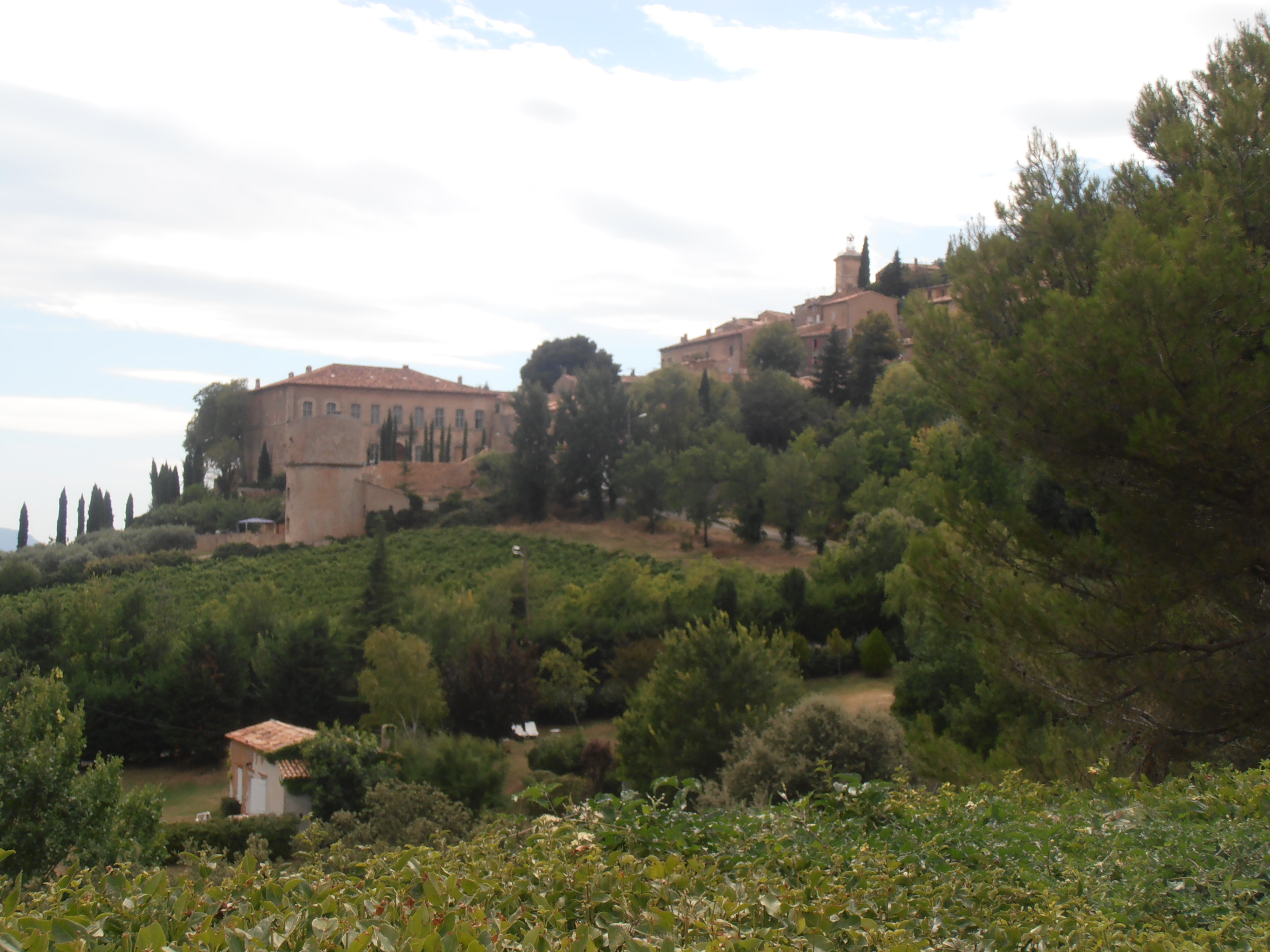 Var, Moissac-Bellevue. Le village et son paysage préservés.